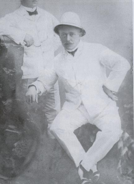 Carl Pettersson in Tropenkleidung